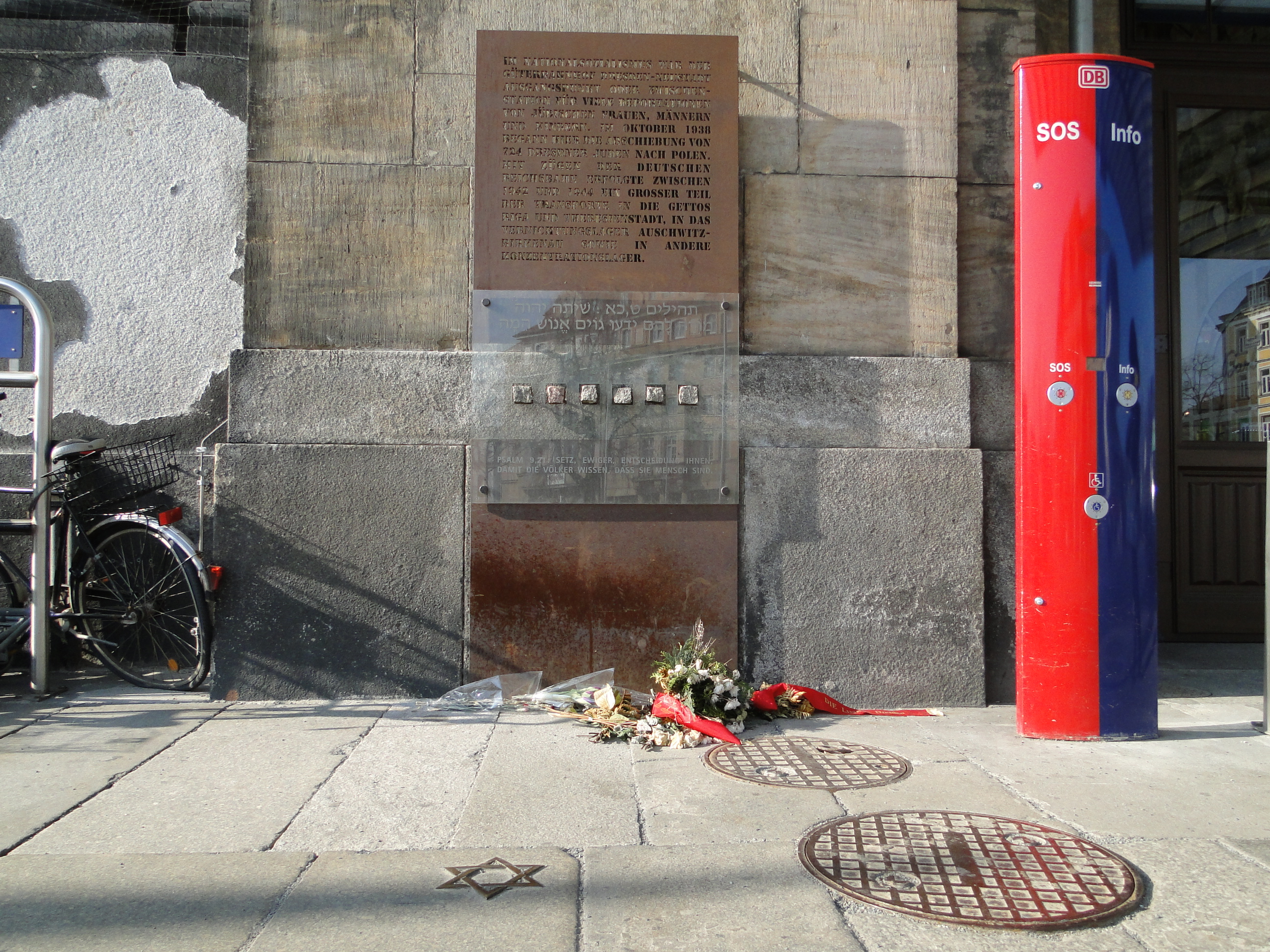 Gedenkstätte